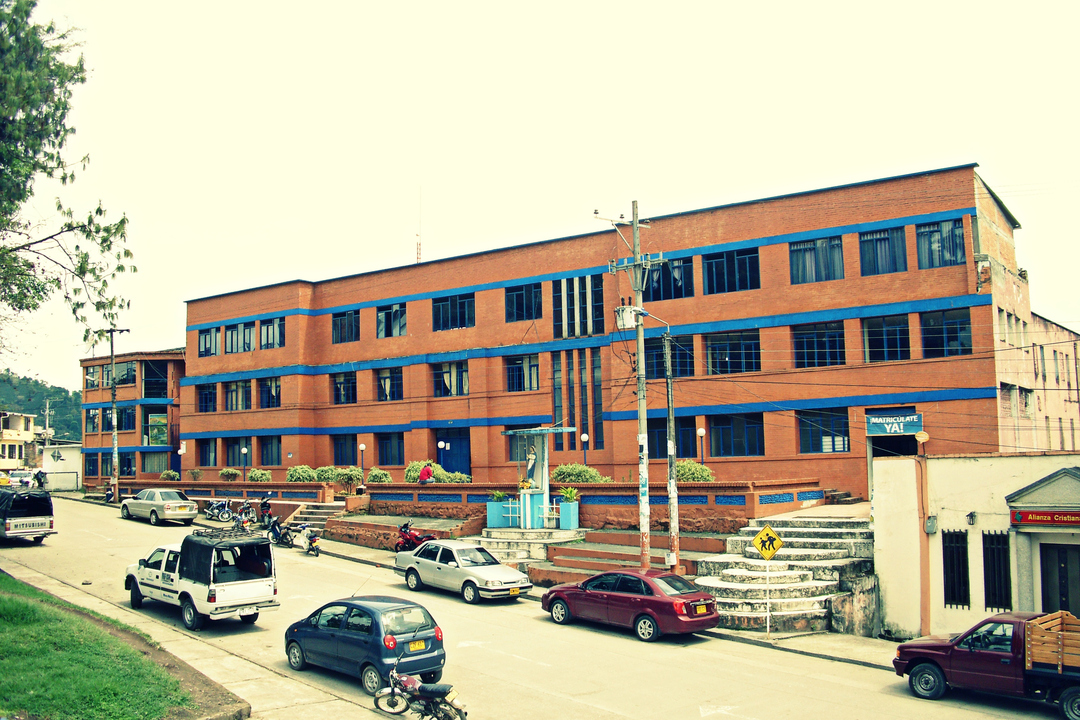 Colegio Juamnbú la union nariño